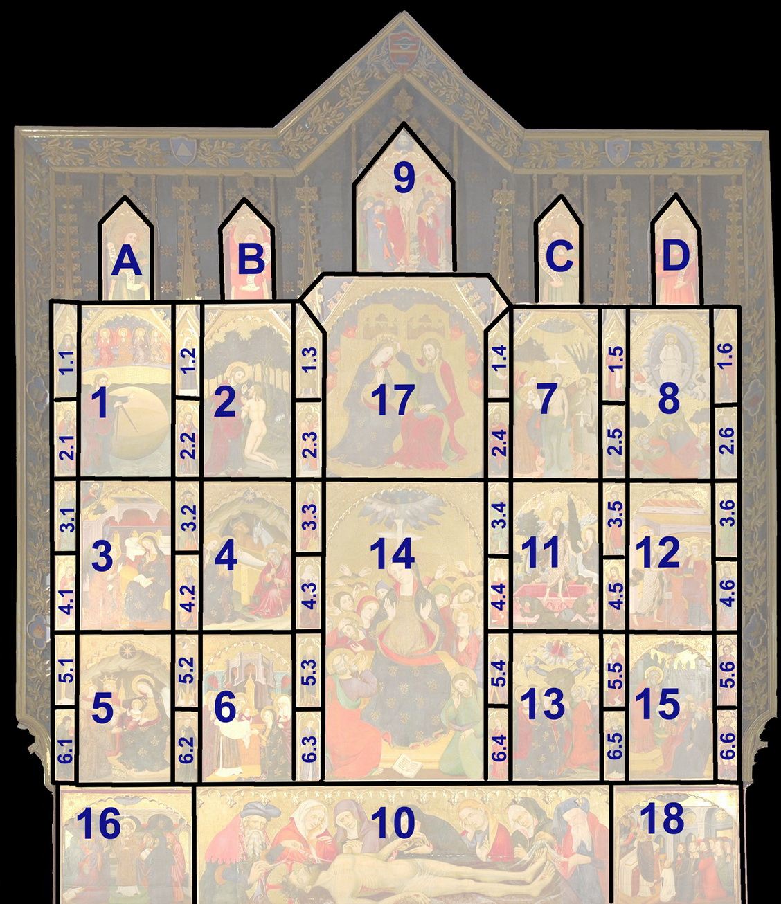 Retaule del Sant Esperit de la Seu de Manresa. Esquema de taules ordenat cronològicament.